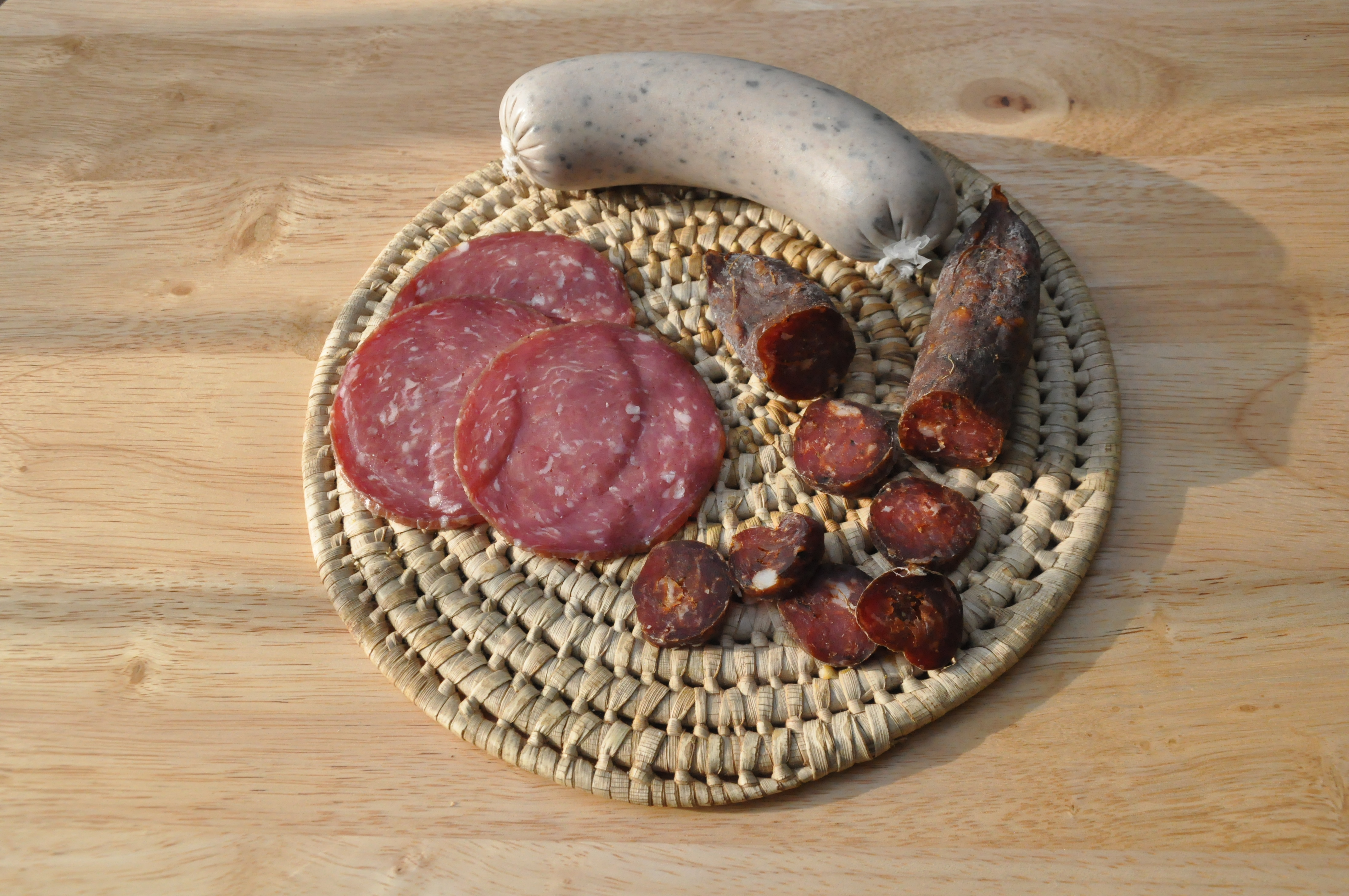 Cecinas de la localidad de Gorbea en Chile, incluye morcilla, salame ahumado y chorizo araucano